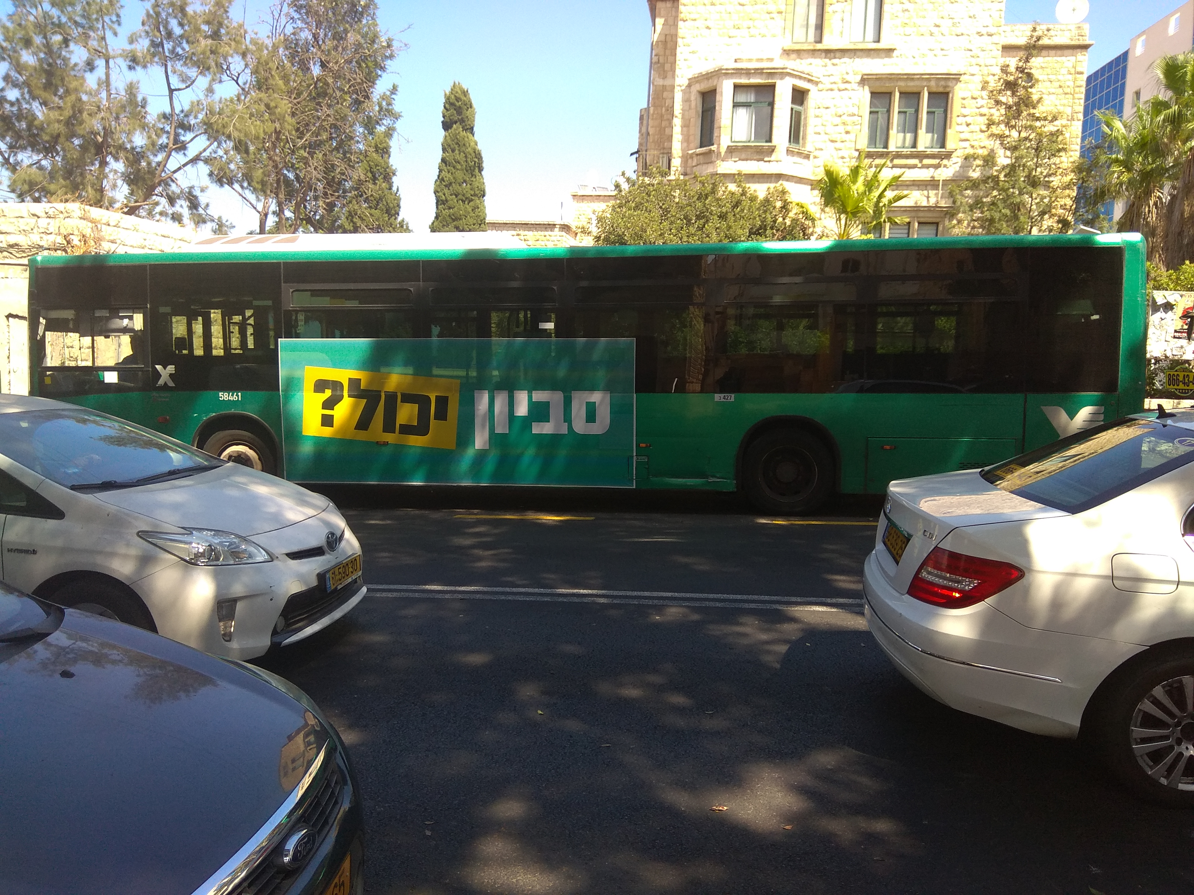 טיזר על אוטובוס